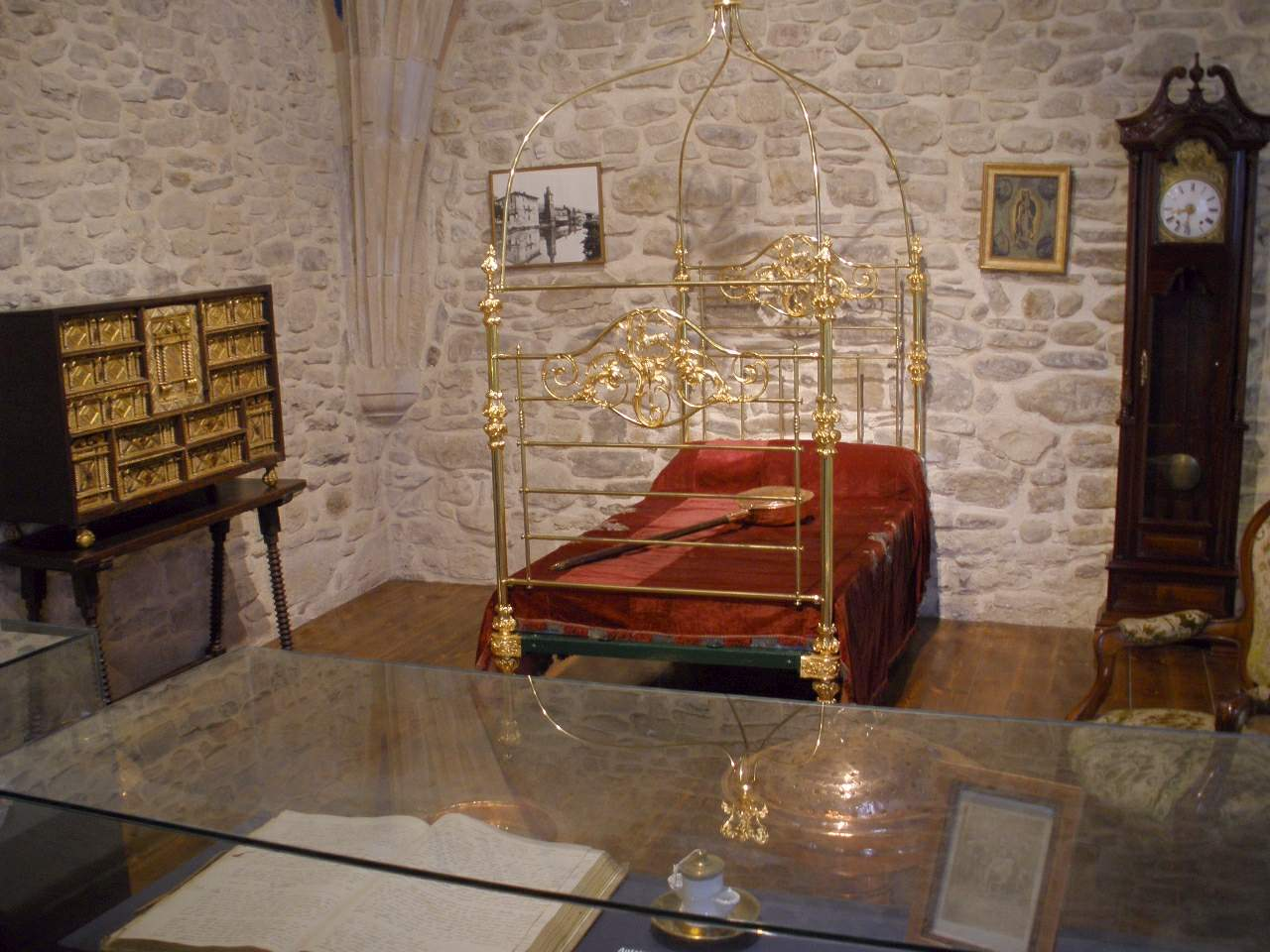 Iglesia de San Juan Bautista del Moral (Balmaseda)